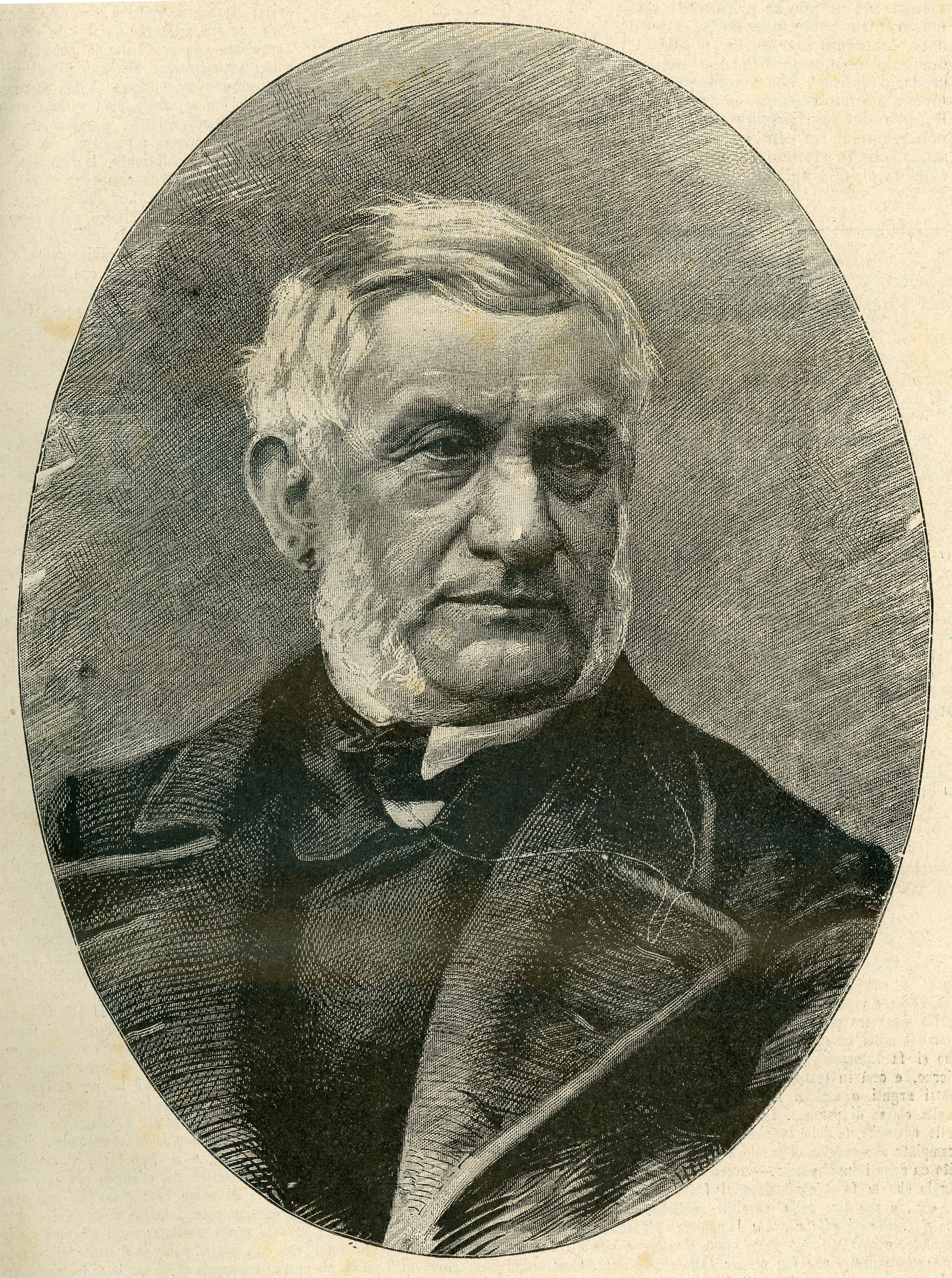 Il principe Alessandro Torlonia, morto a Roma il 7 febbraio.